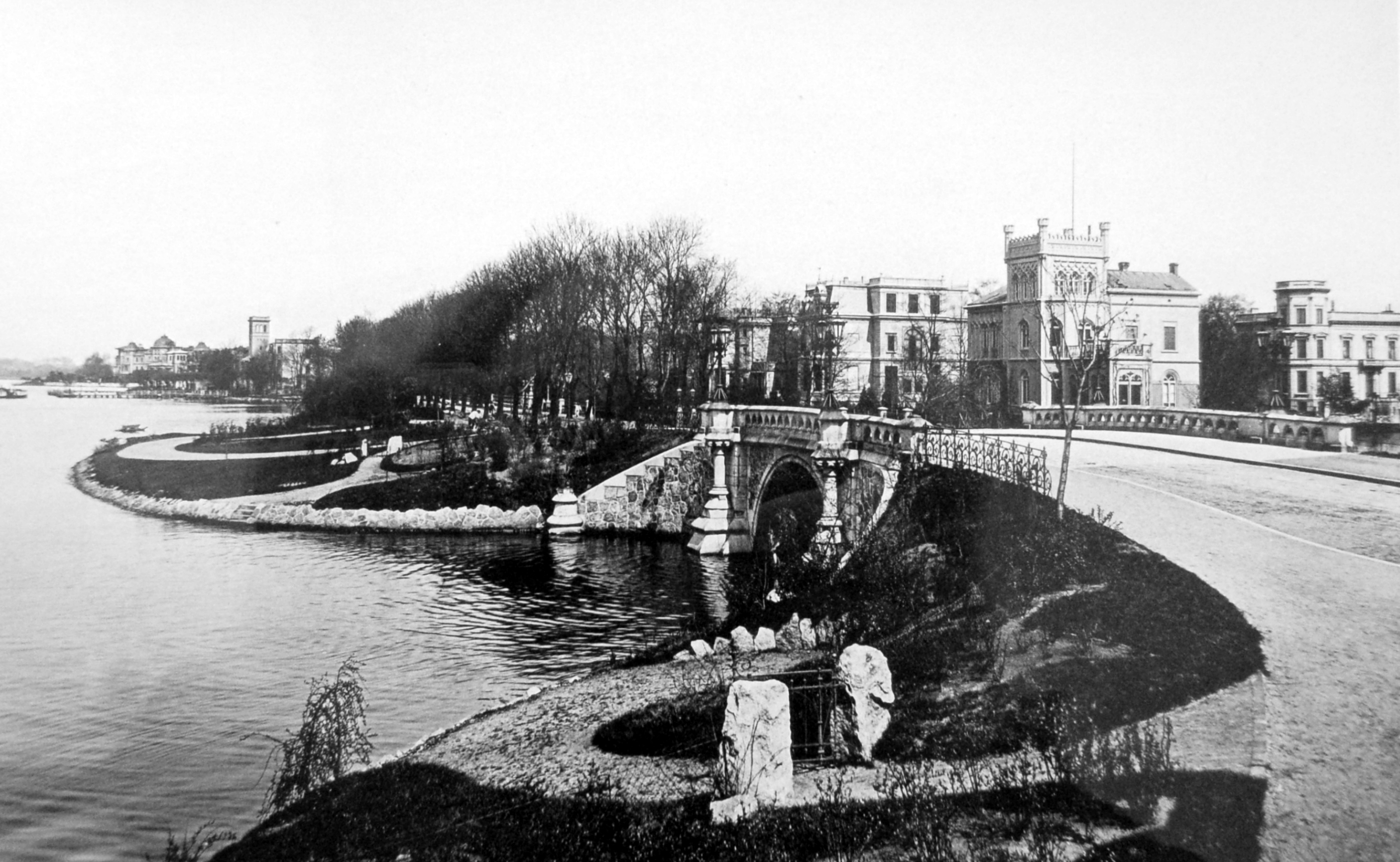 Die Schwanenwikbrücke, im Hintergrund der Turm des Uhlenhorster Fährhauses